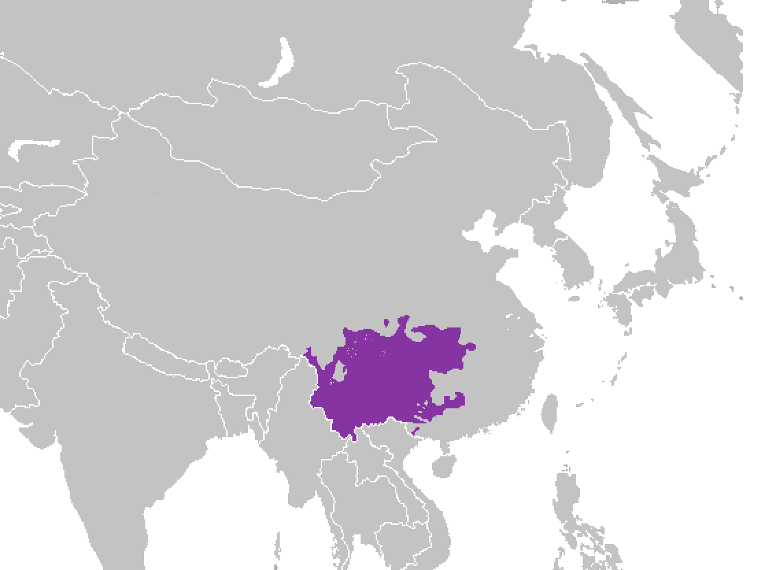 Mandarín del Suroeste